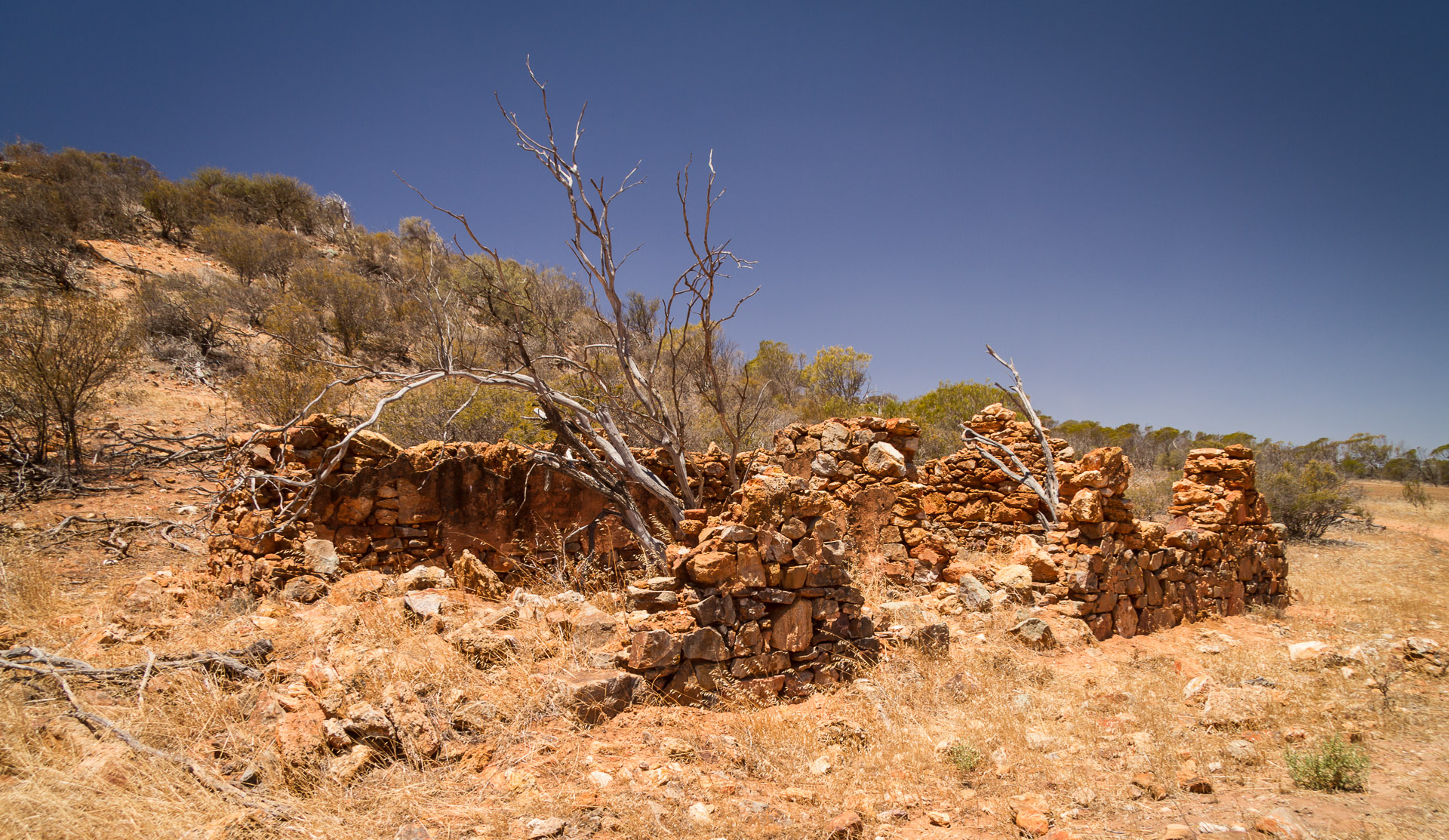 Cottage ruins